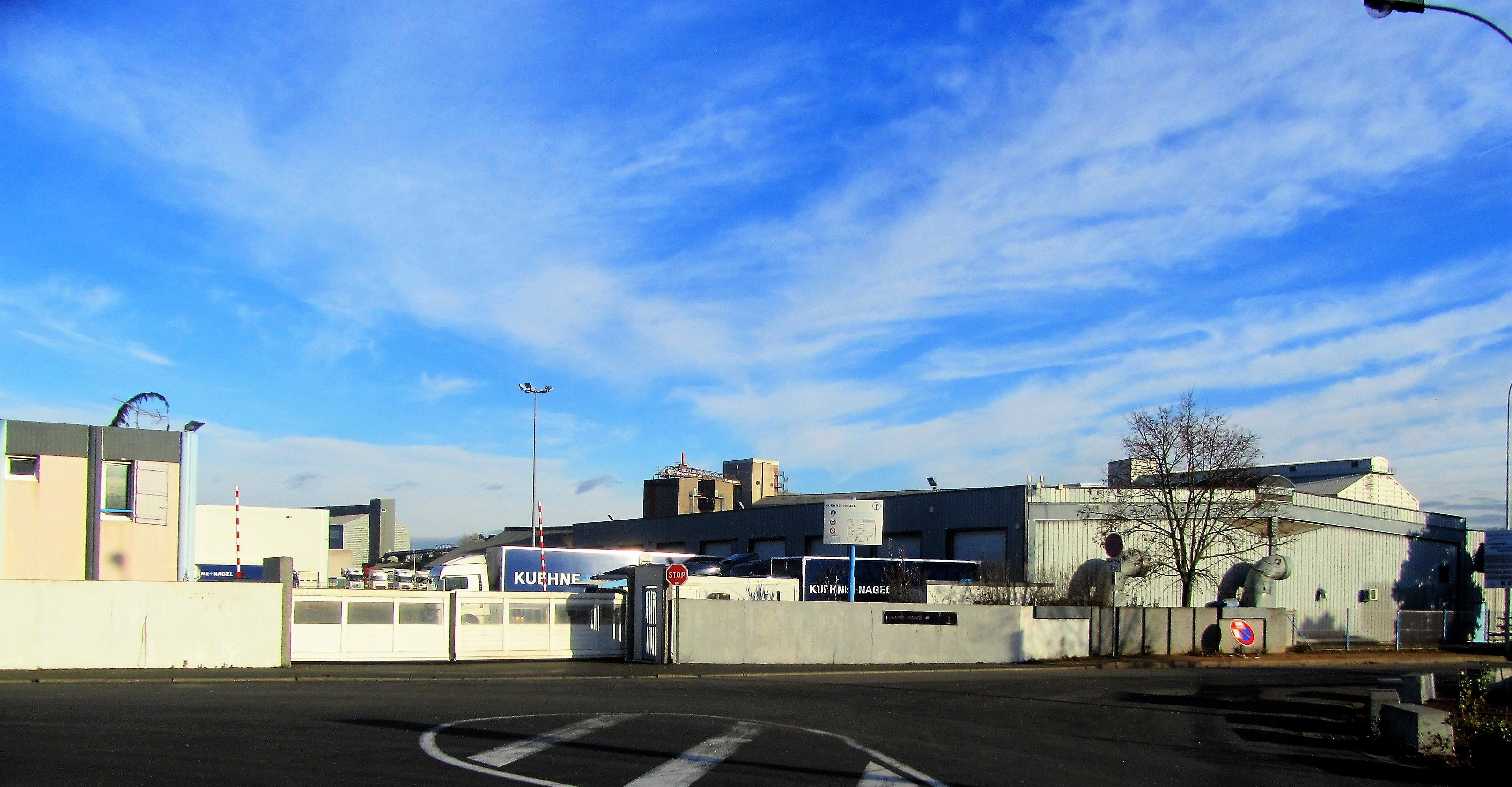 Kuhn Nagel Road